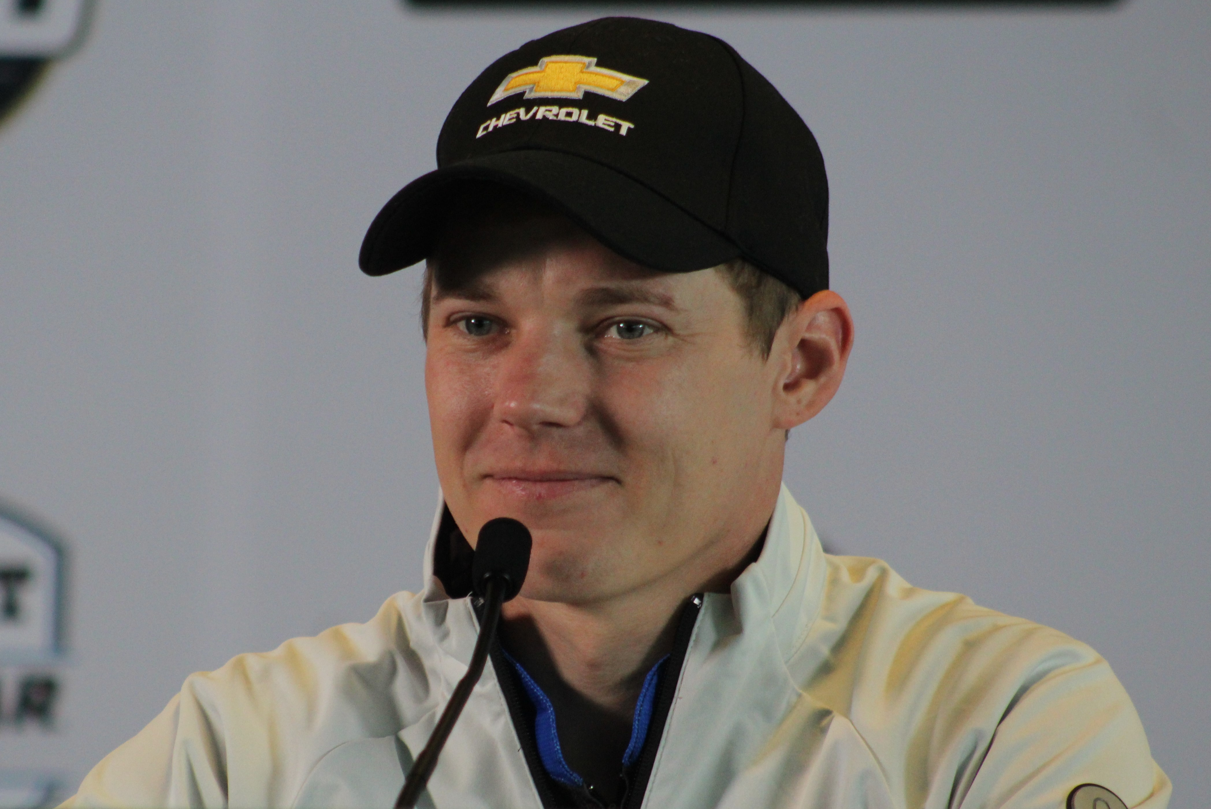 2019 Indianapolis 500